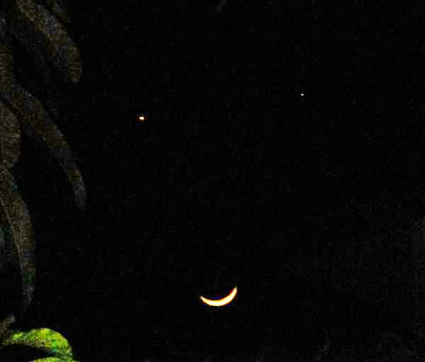 ภาพดาวศุกร์ ดาวพฤหัสบดี และดวงจันทร์ เรียงเป็นรูปหน้ายิ้ม